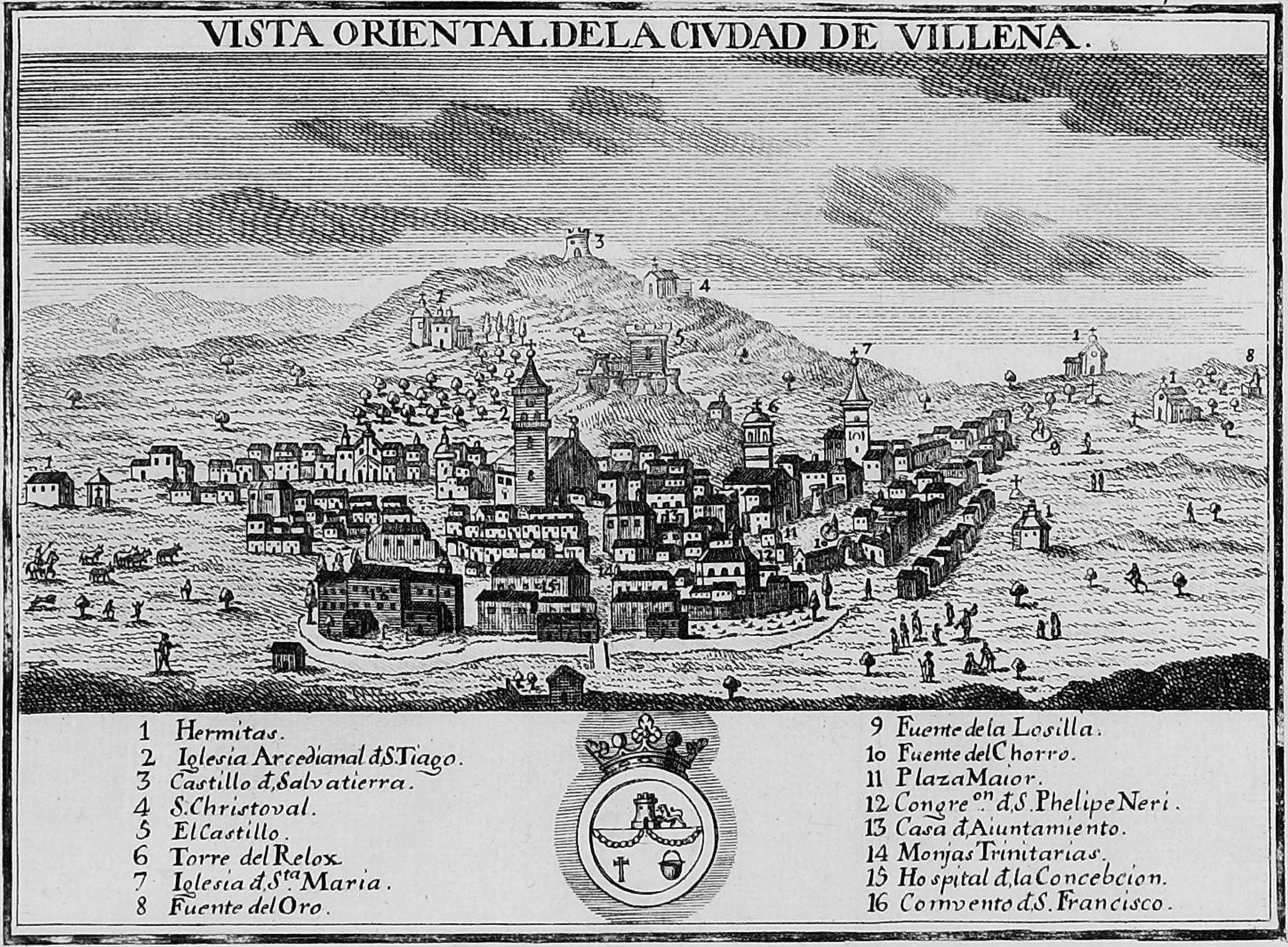 Grabado de Juan Fernando Palomino, en el volumen del Reyno de Murcia del Atlante español de Bernardo Espinalt y García, publicado en 1778